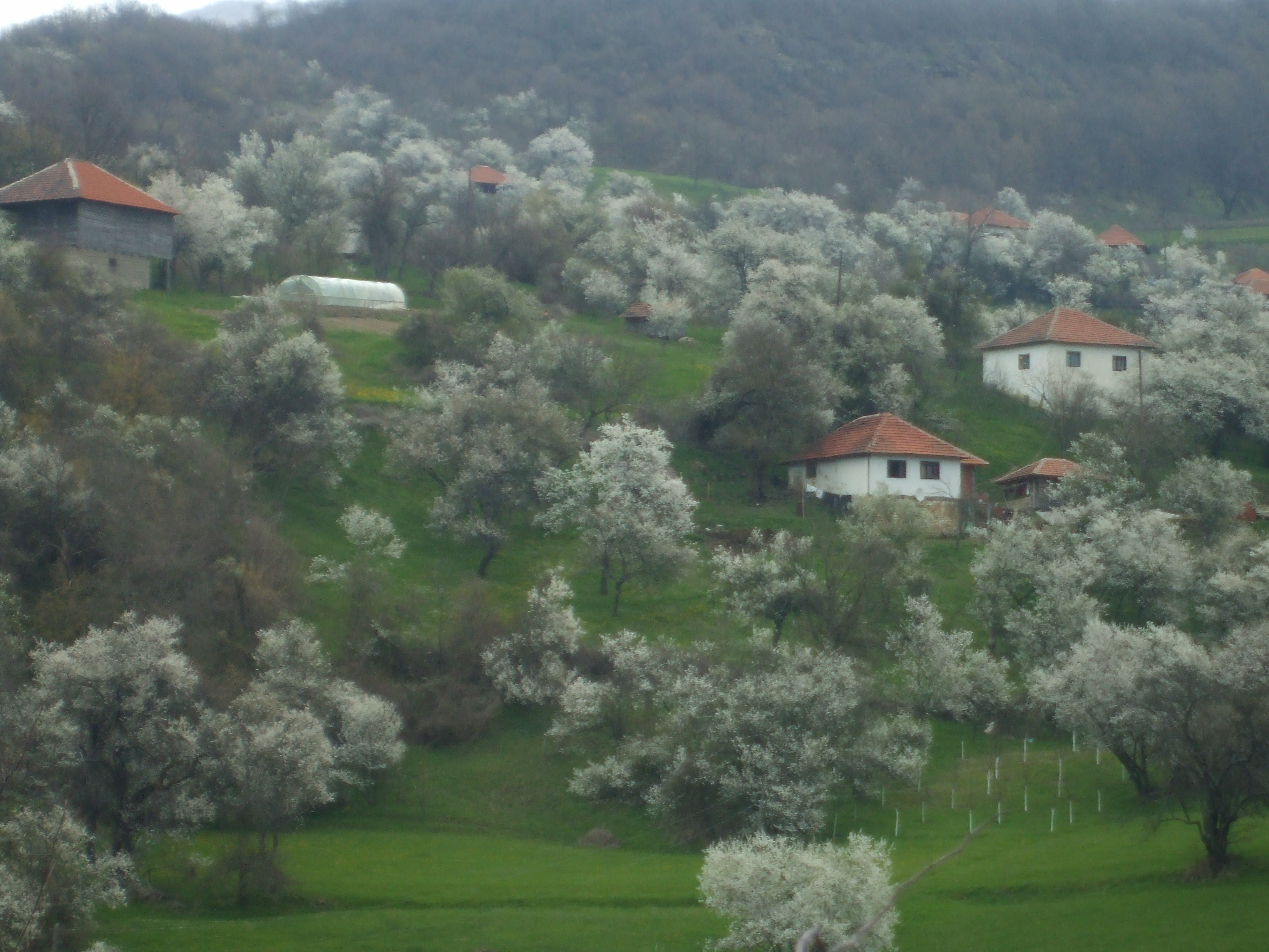 Детаљ из Горње махале. Снимио Драгољуб.